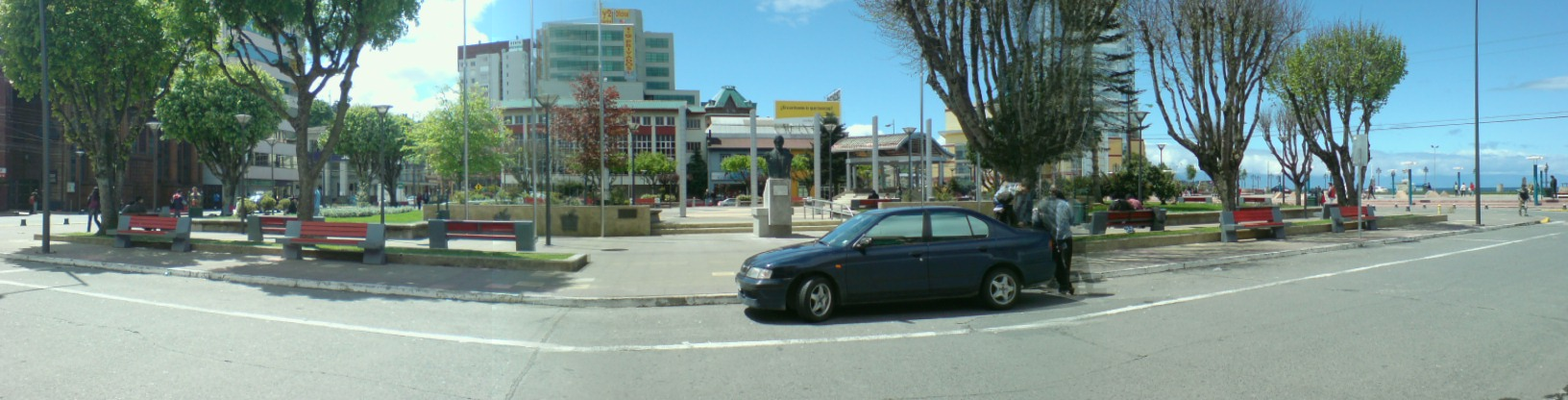 Vista panorámica de la plaza de armas de Puerto Montt. Tomada desde la acera de la Gobernación Provincial